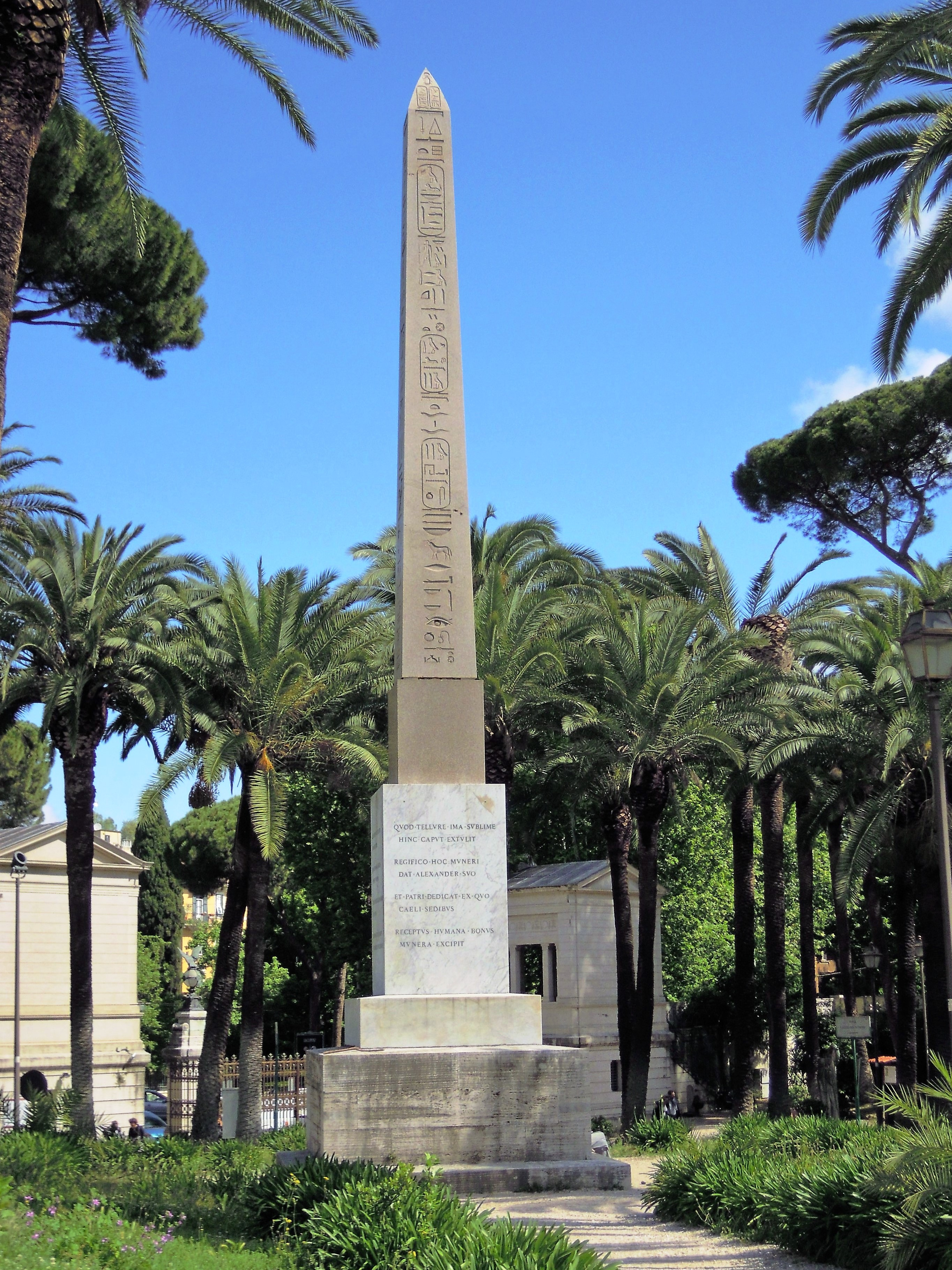 Roma, Villa Torlonia - obelisco dedicato a Giovanni Raimondo Torlonia, padre di Alessandro